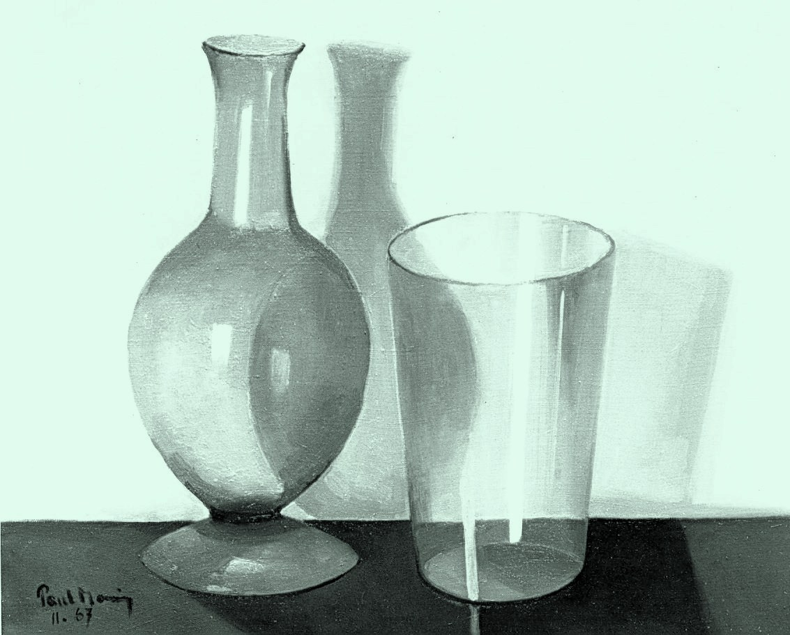 Verre de Venise par le peintre suisse Paul Monnier, 54 x 65 cm, huile sur toile.